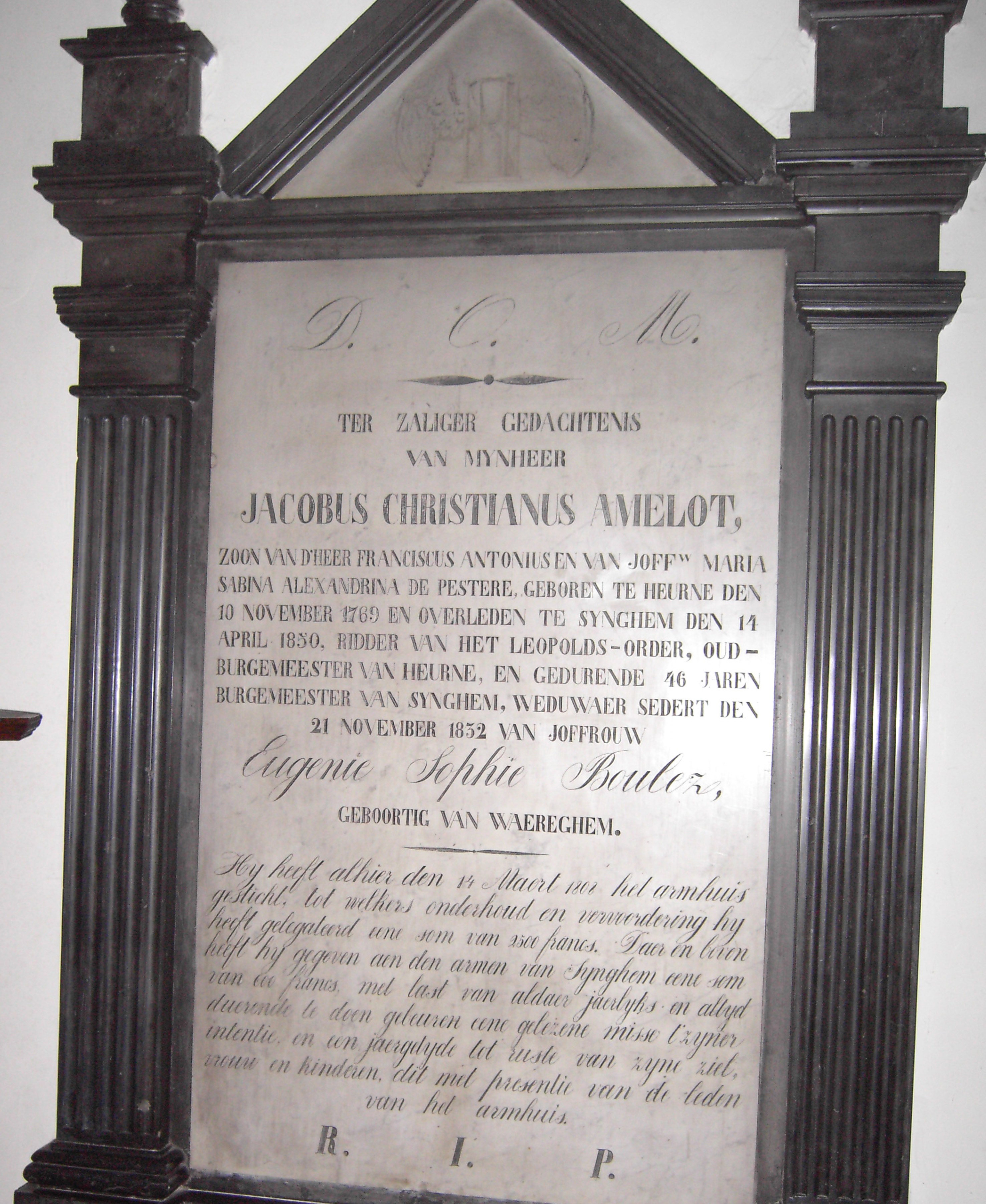 Zingem - Belgium - In kerk - gedenksteen Amelot Jacobus (1769-1850)